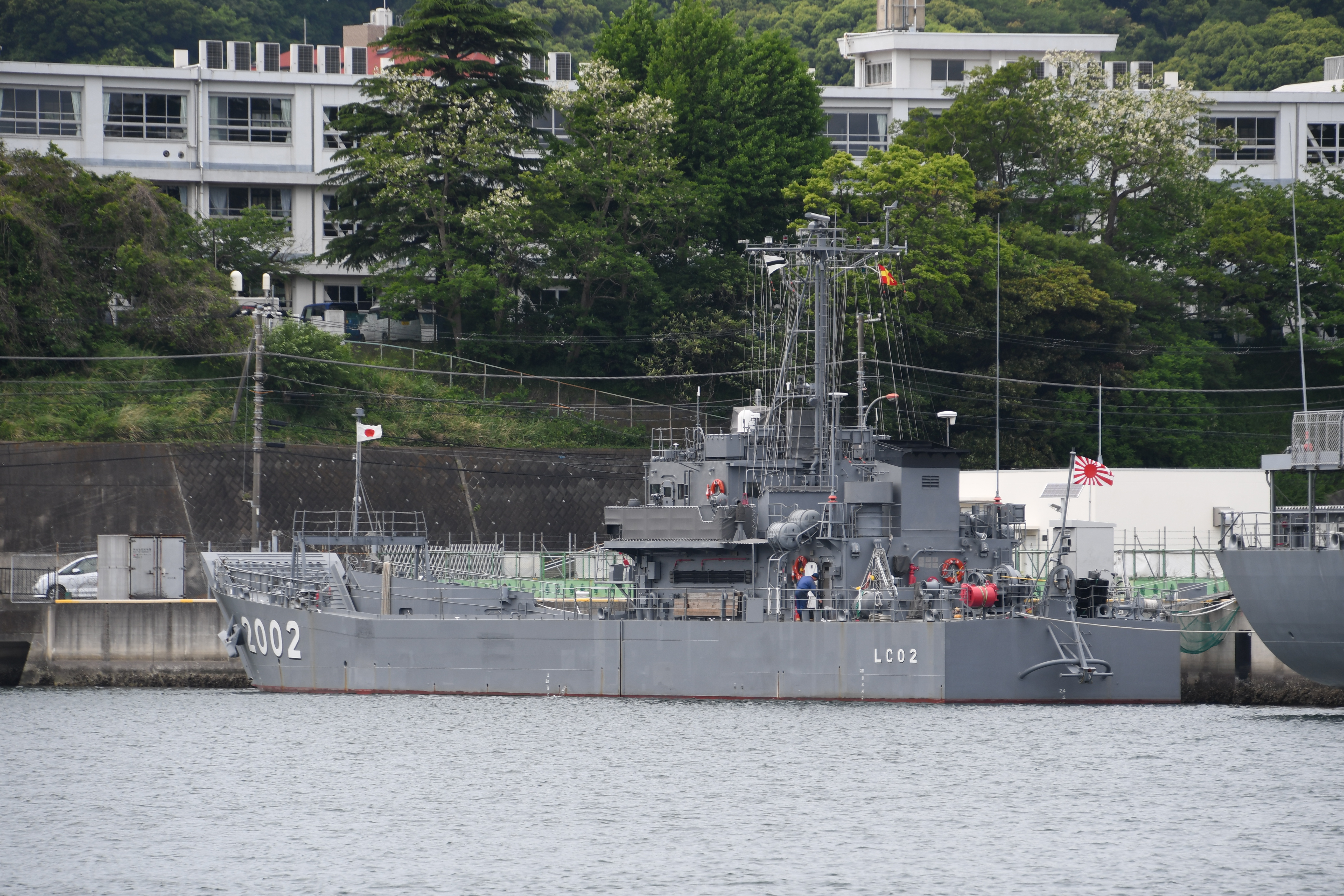 輸送艇2号（LC-2002） 左後部。2018年4月30日 海上自衛隊横須賀基地にて。